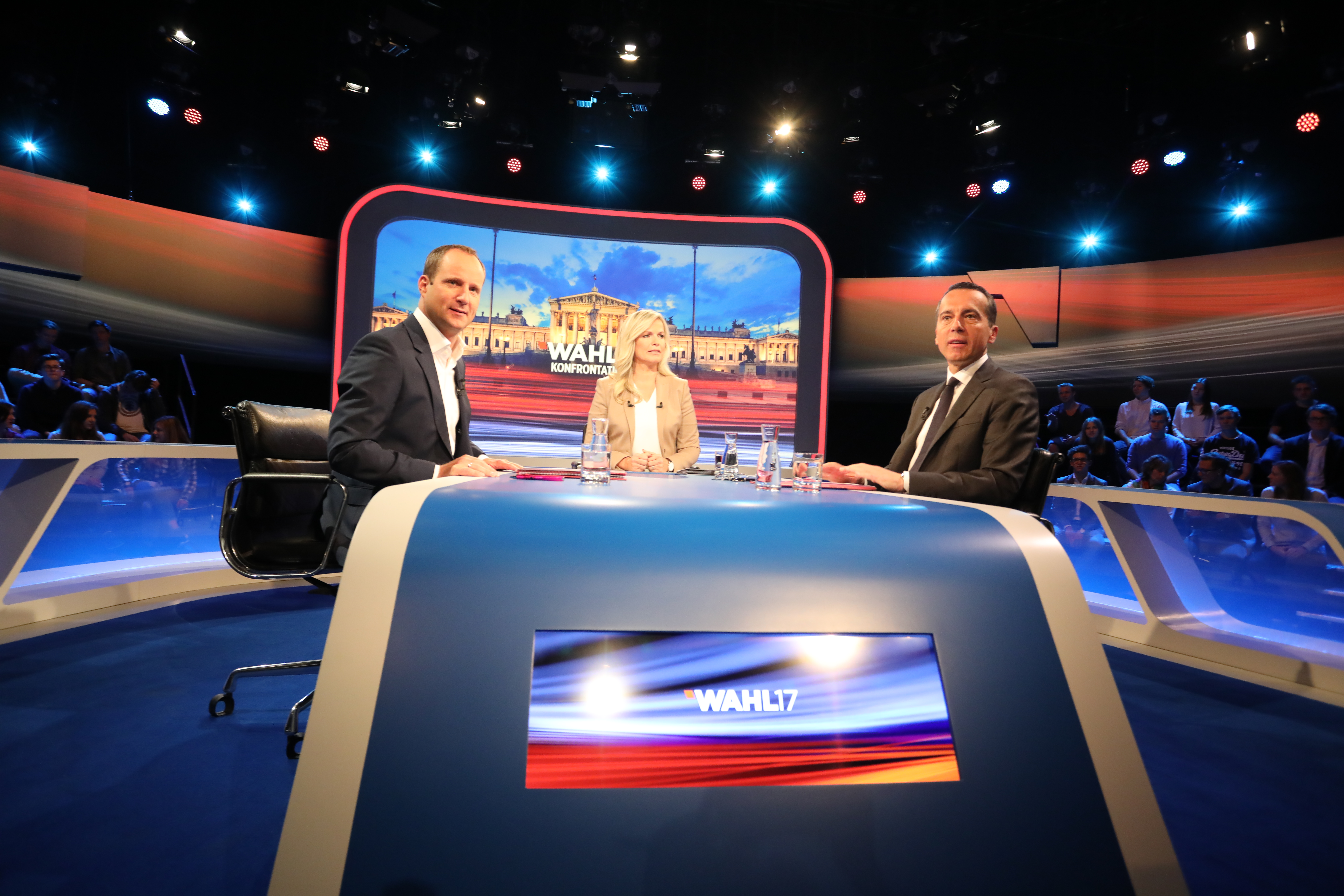 ORF-TV-Duell mit Bundeskanzler Christian Kern und Neos-Chef Matthias Strolz am 21.9.2017 (Fotos: SPÖ/Zach-Kiesling).